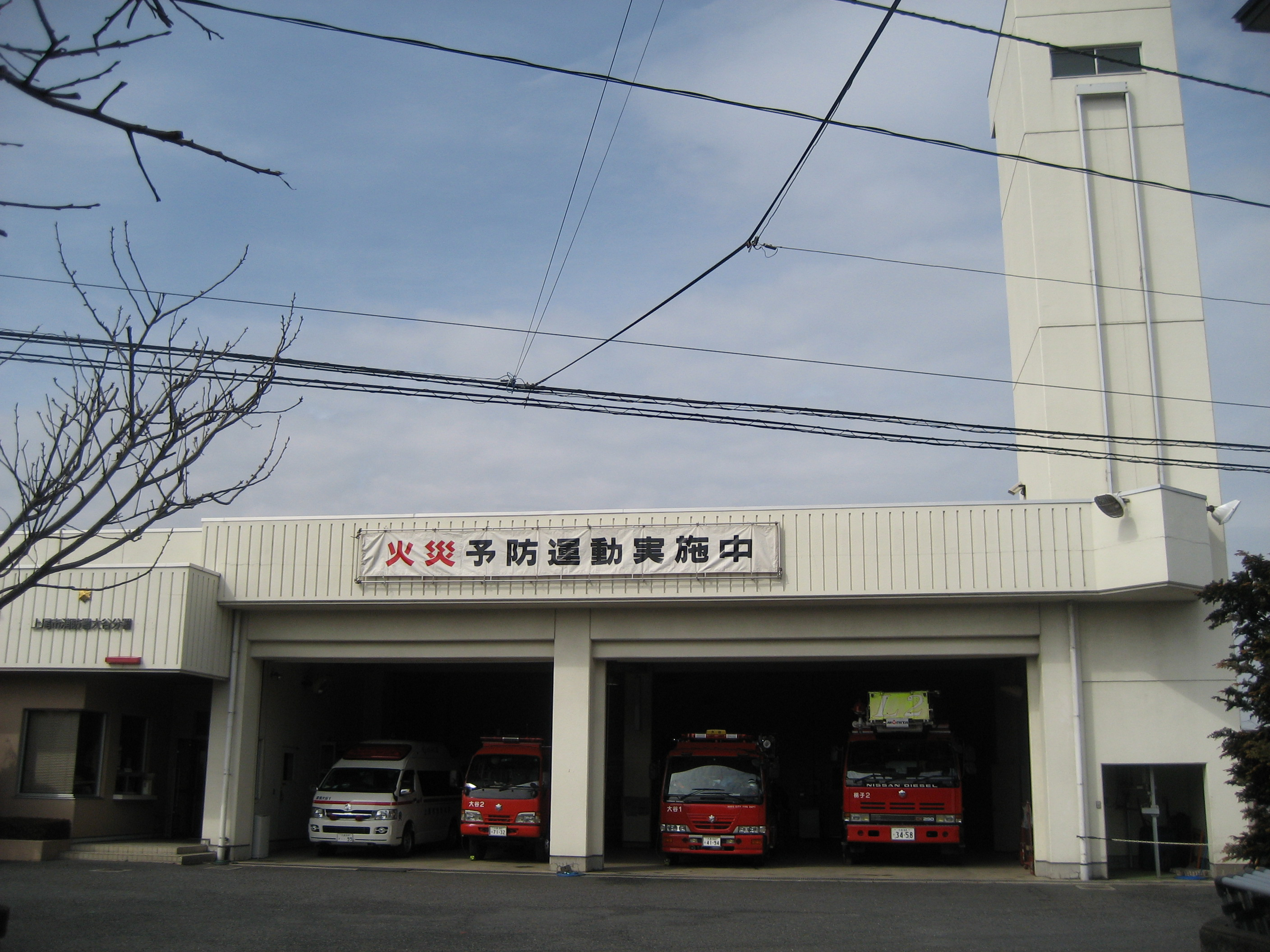 上尾市消防本部大谷分署